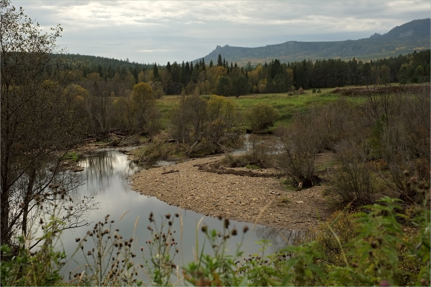 По дороге на Кумардак